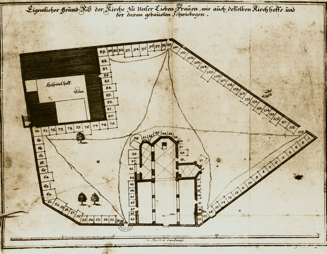 "Eigentlicher Grund-Riß der Kirche zu Unser Lieben Frauen wie auch derselben Kirchhoffs und der daran gebaueten Schwiebogen". Grundriss der alten Frauenkirche mit Kirchhof und Maternihospital von Moritz Bodenehr